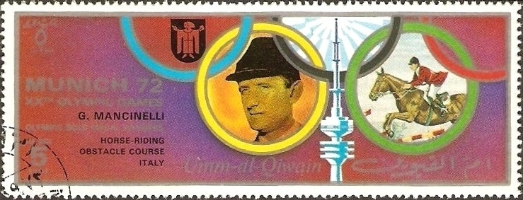 Graziano Mancinelli